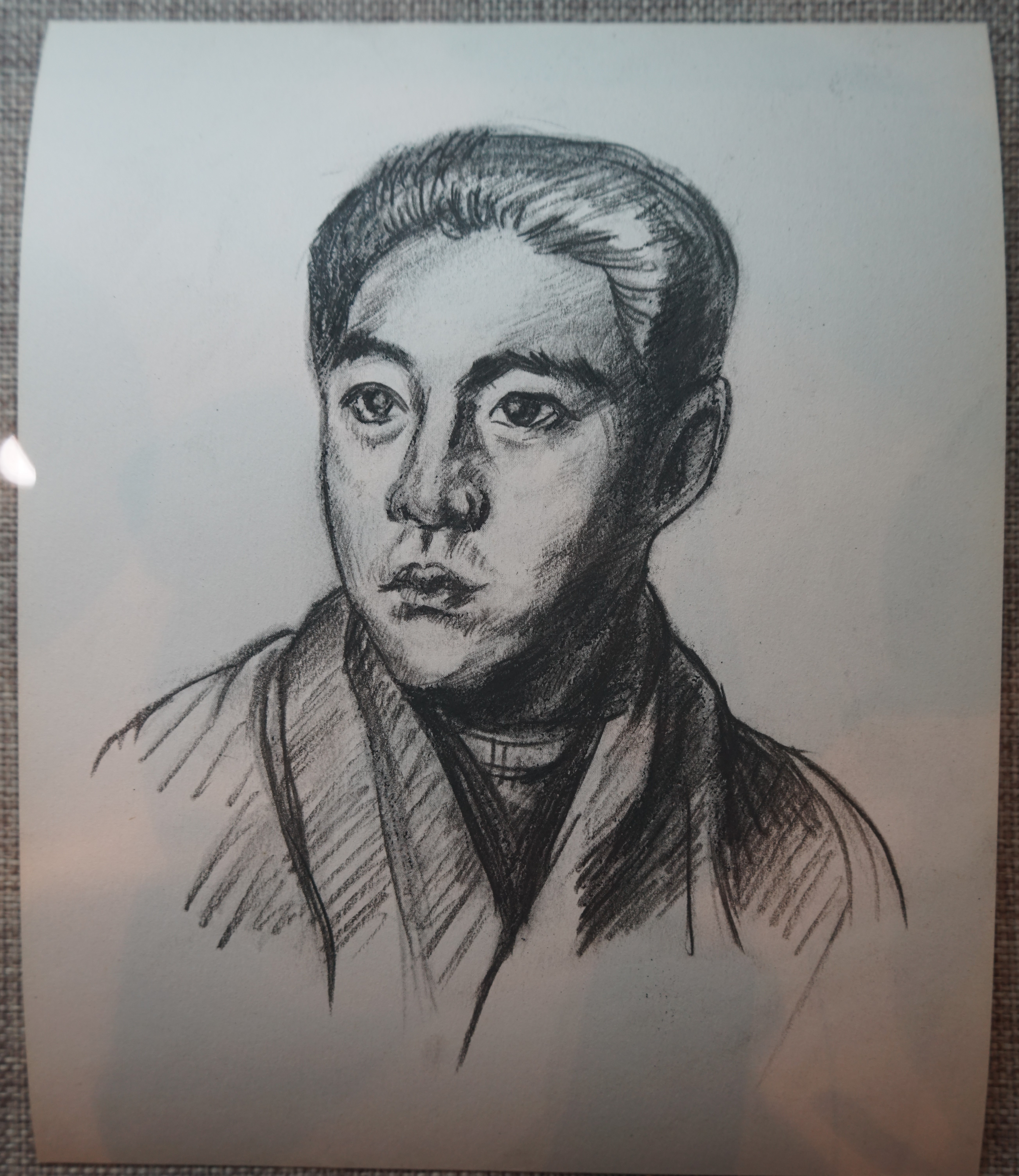 中文（中国大陆）: 1917年留日时期的周恩来素描画